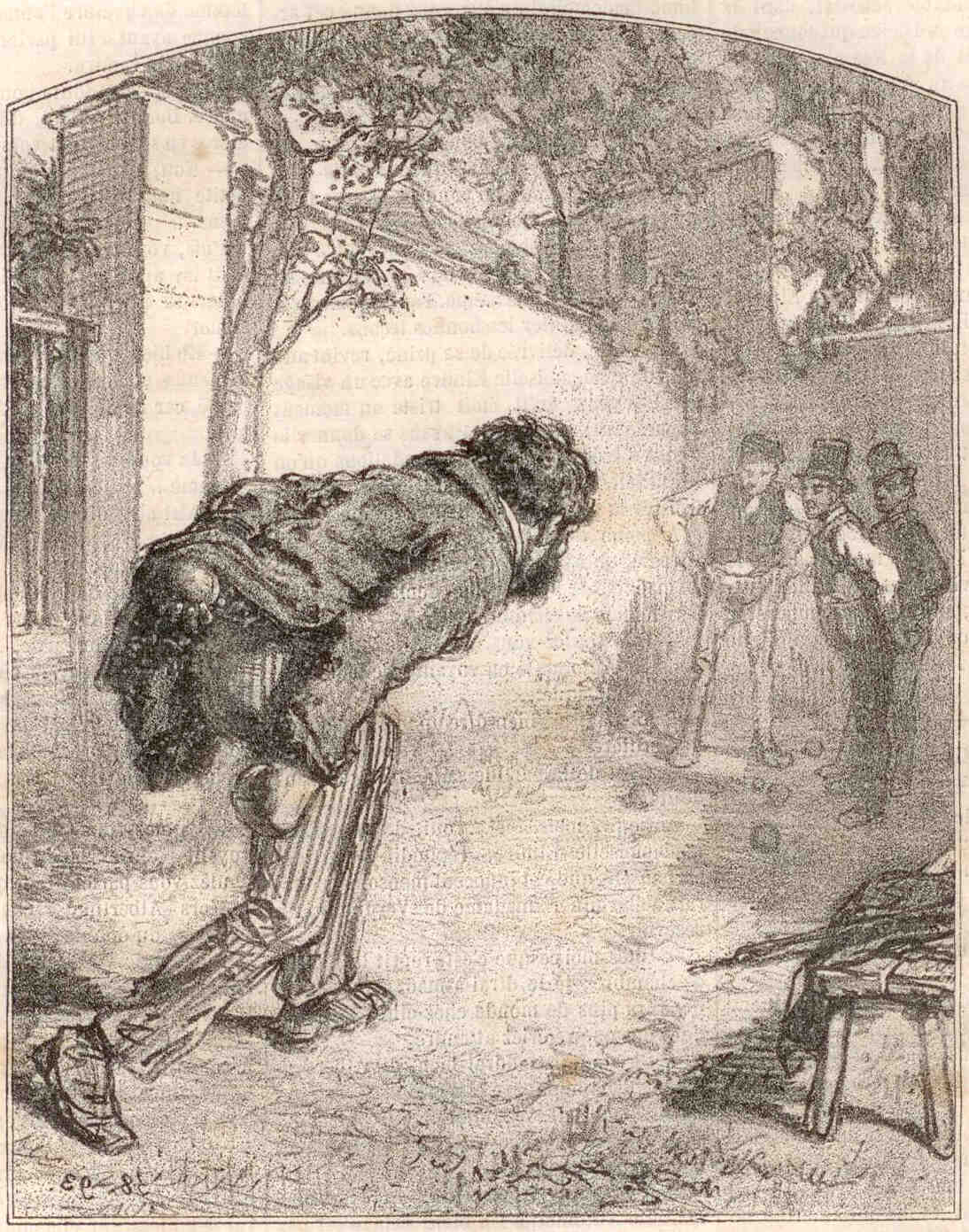 Gravure de Gavarni montrant un joueur de boules